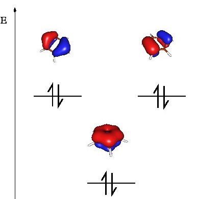 Orbital Molekularraren Teoriaren arabera bentzenoaren balentzia elektroien orbital molekularren diagrama.